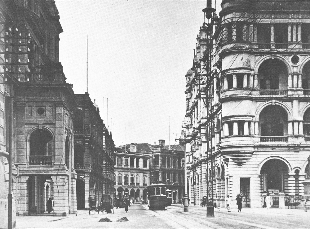 德輔道中之太子行及一輛單層電車. Des Voeux Road Central, with HSBC Hong Kong headquarters building (second design)on the left and the first generation of Prince's Building on the right.